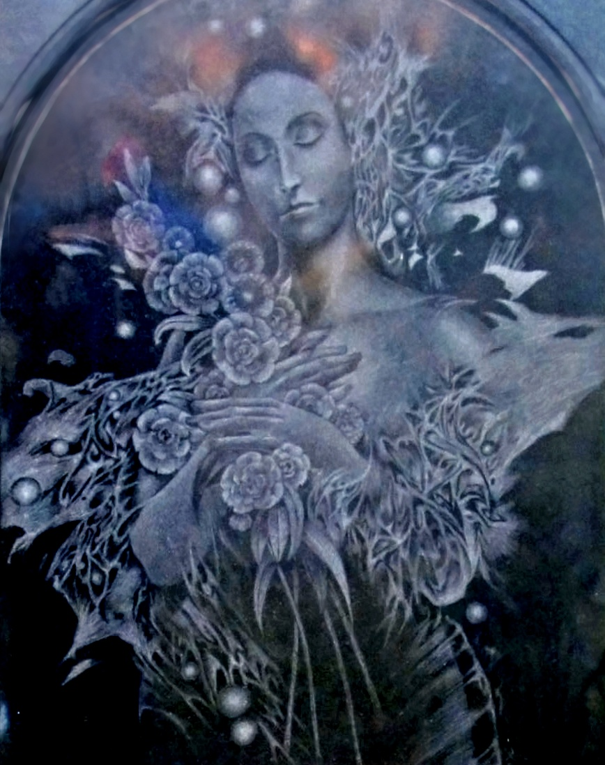 Detailů náhrobku malíře Josefa Kábrta Josef Kábrt (painter) - Detail of grave art.